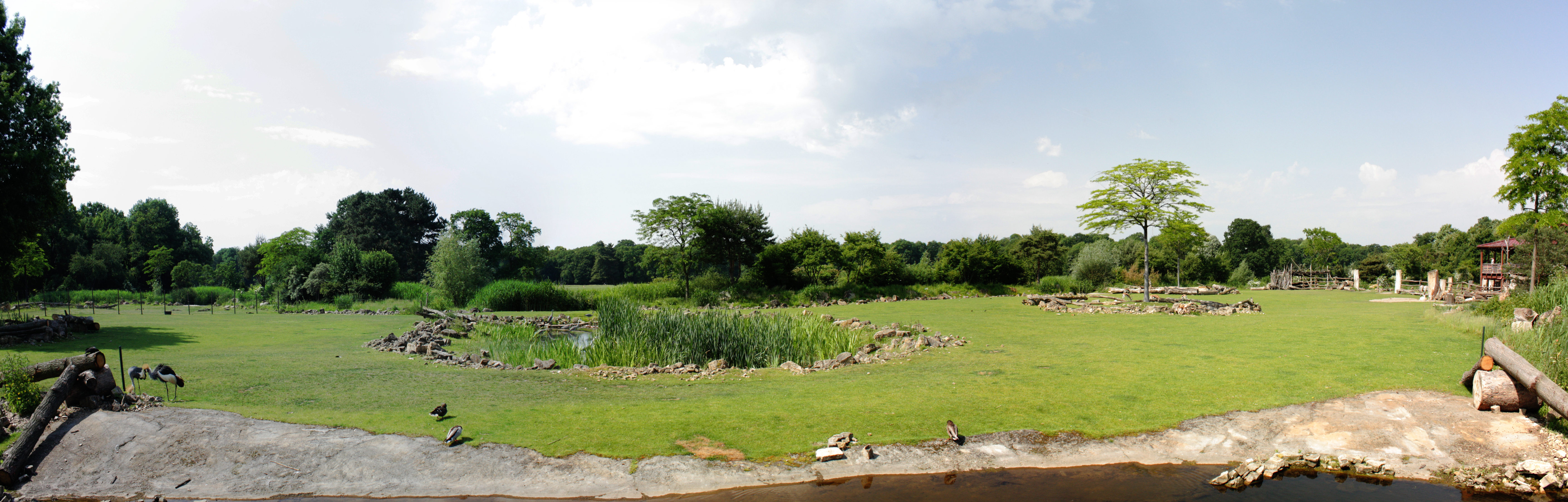 Panorama der Kiwara-Savanne des Zoo Leipzig